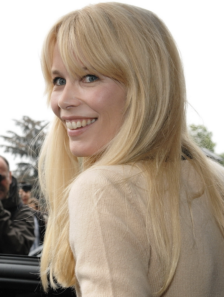 Défilé Channel printemps/été 2010 prêt-à-porter au Grand Palais (Avenue du Général Eisenhower - Paris 75008) Karl Lagerfeld a fait fort, en transformant le Grand Palais en étable géante.Des People en pagaille emmenés par Lily Allen (ambassadrice de la ligne Coco Cocoon) suivi de Bernadette Chirac, Claudia Schiffer, Rihanna, Virginie Ledoyen, Anna Wintour, Sean Lennon et Charlotte Kemp Muhl, Marie-Josée Croze, Prince accompagné de sa fiancée, et Irina Lazareanu, l'ex de Pete Doherty.